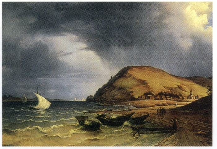 Иванов-Голубой, Антон Иванович. Вид села Винновки на Волге в Симбирской губернии. Государственный Русский музей. 1841 (6?). Холст, масло. 48 х 71